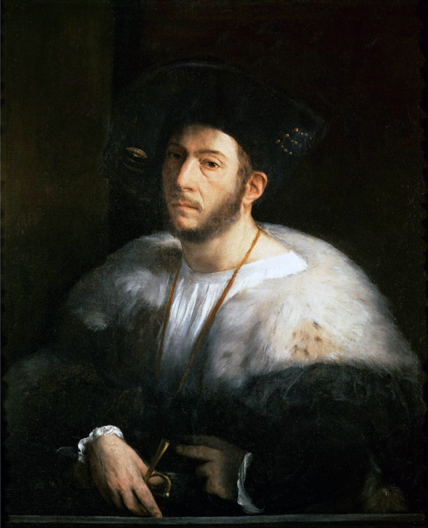 Former title: "Cesare Borgia". Louvre, Ancienne collection INV. 866